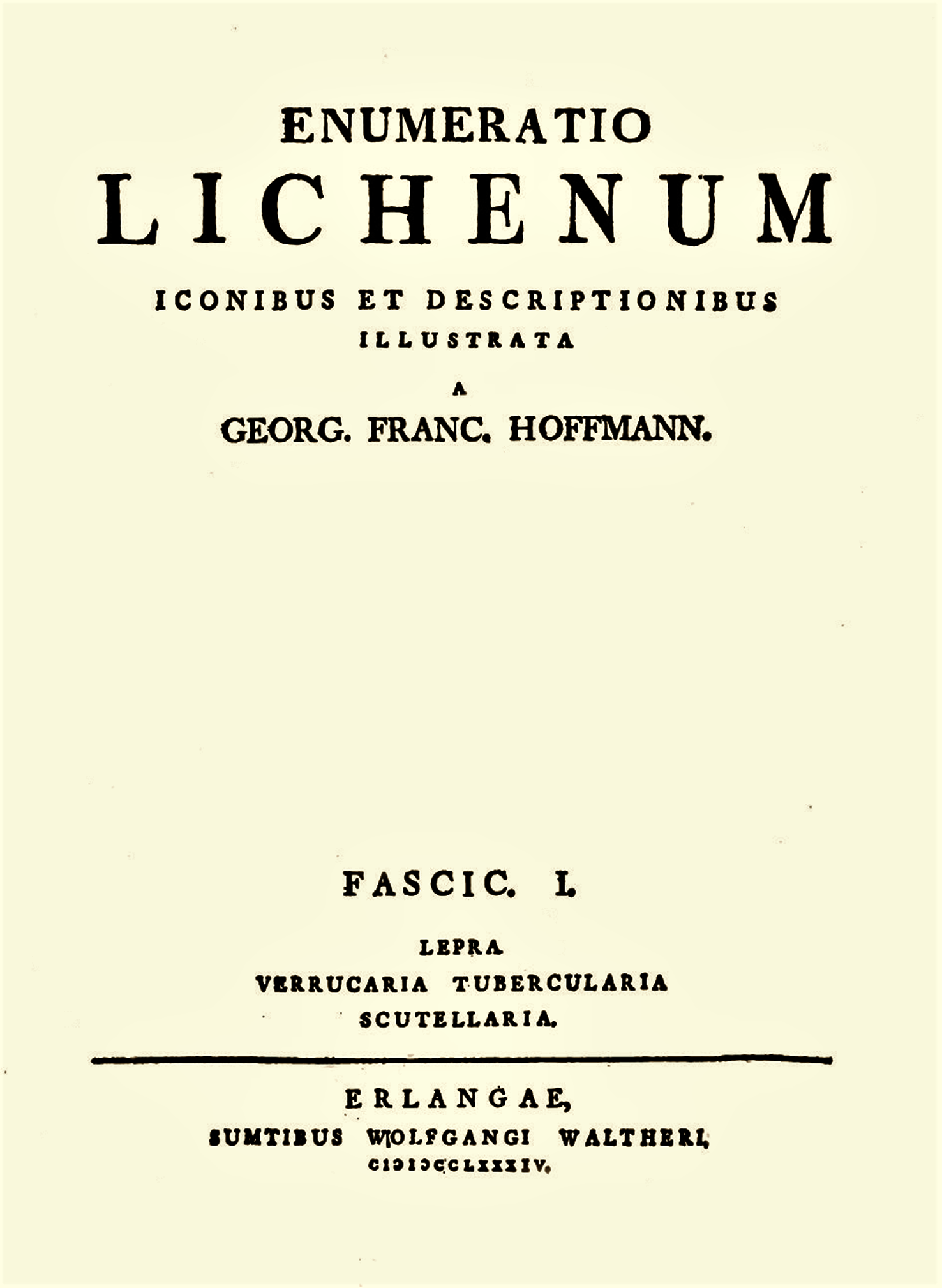 Georg Franz Hoffmann (1760-1826) „Enumeratio lichenum iconibus et descriptionibus illustrata”, Editura Wolfgang Walther, Erlangen 1784, 1. Seite